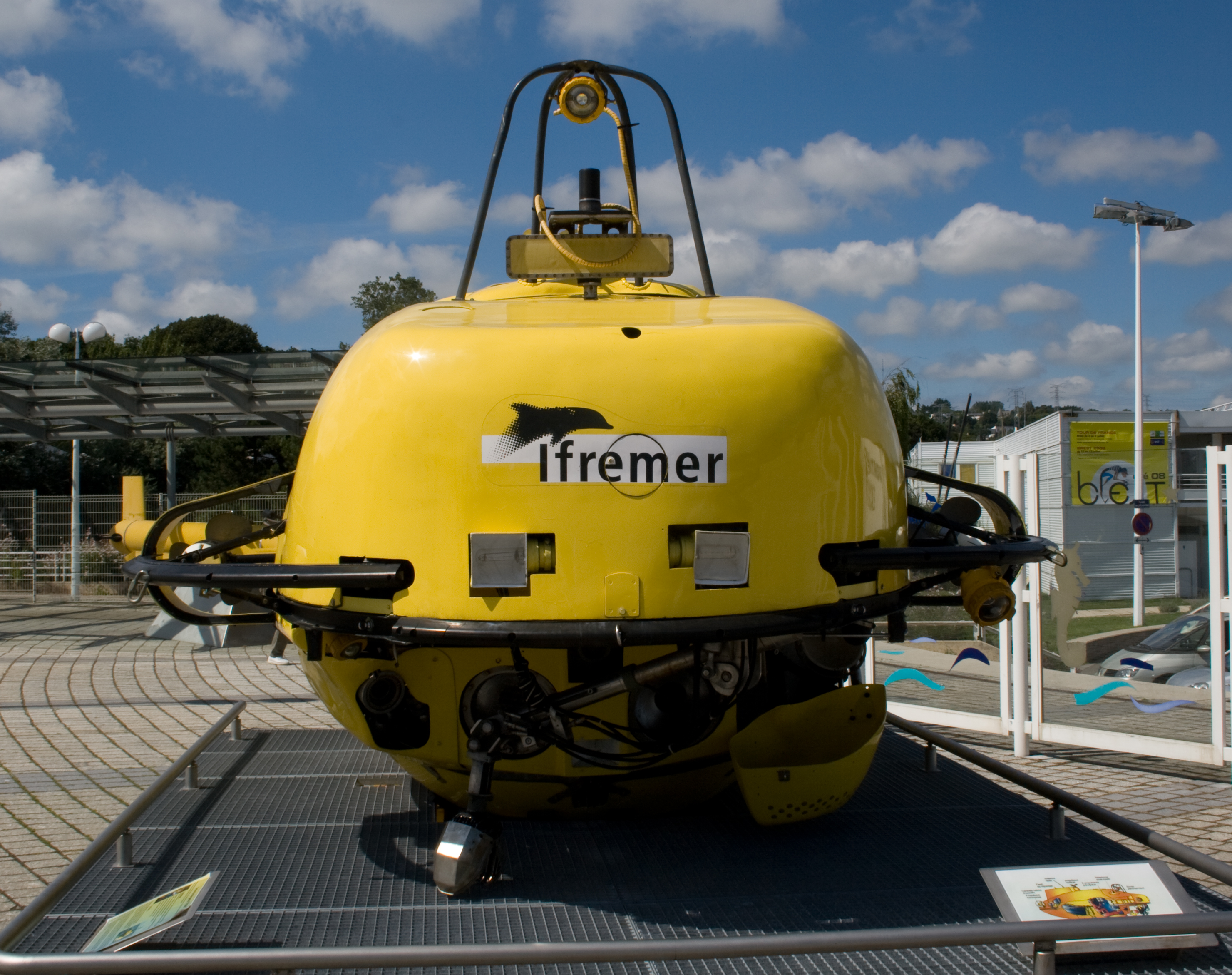 Sous-marin Cyana de l'IFREMER à Océanopolis à Brest